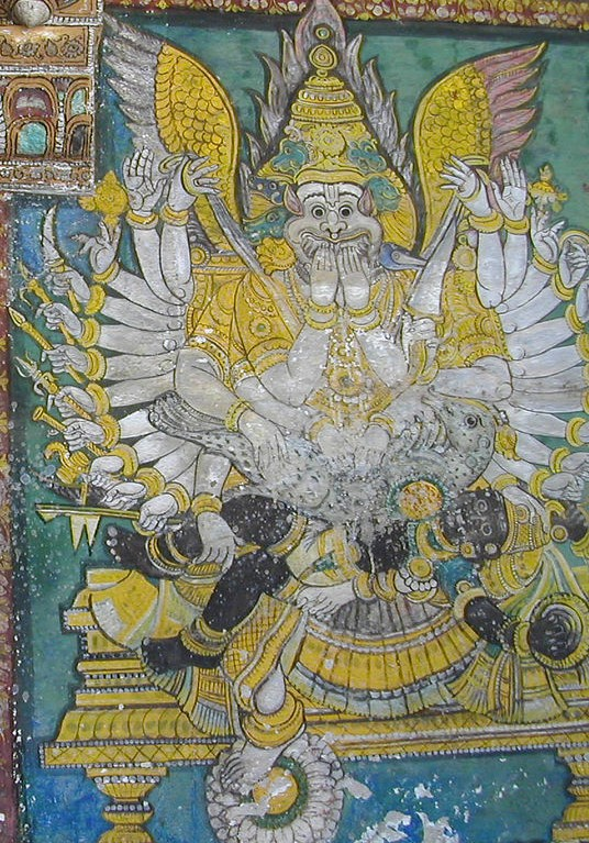 Ashtamukha Gandaberunda Narasimha slaying Sharabha